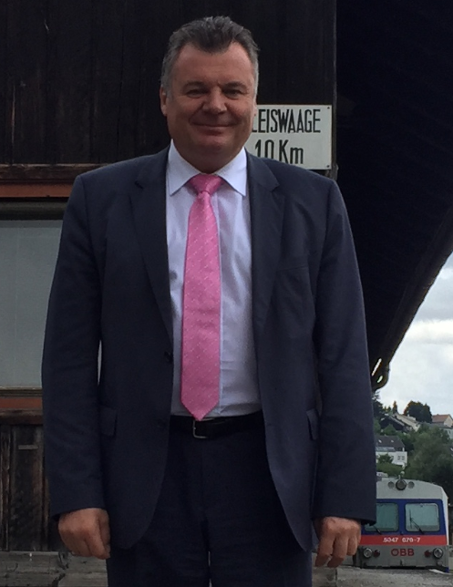 Landesrat Steinkellner am Bahnhof